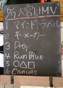 amiinaセトリボード(20150607(1))